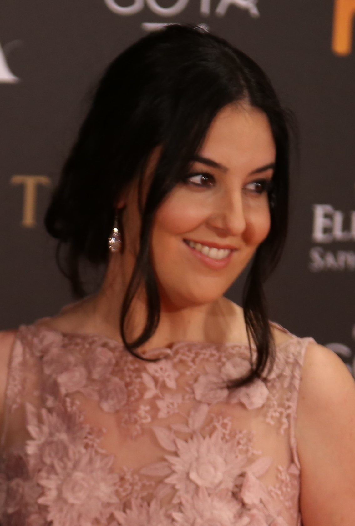 Premios Goya 2017